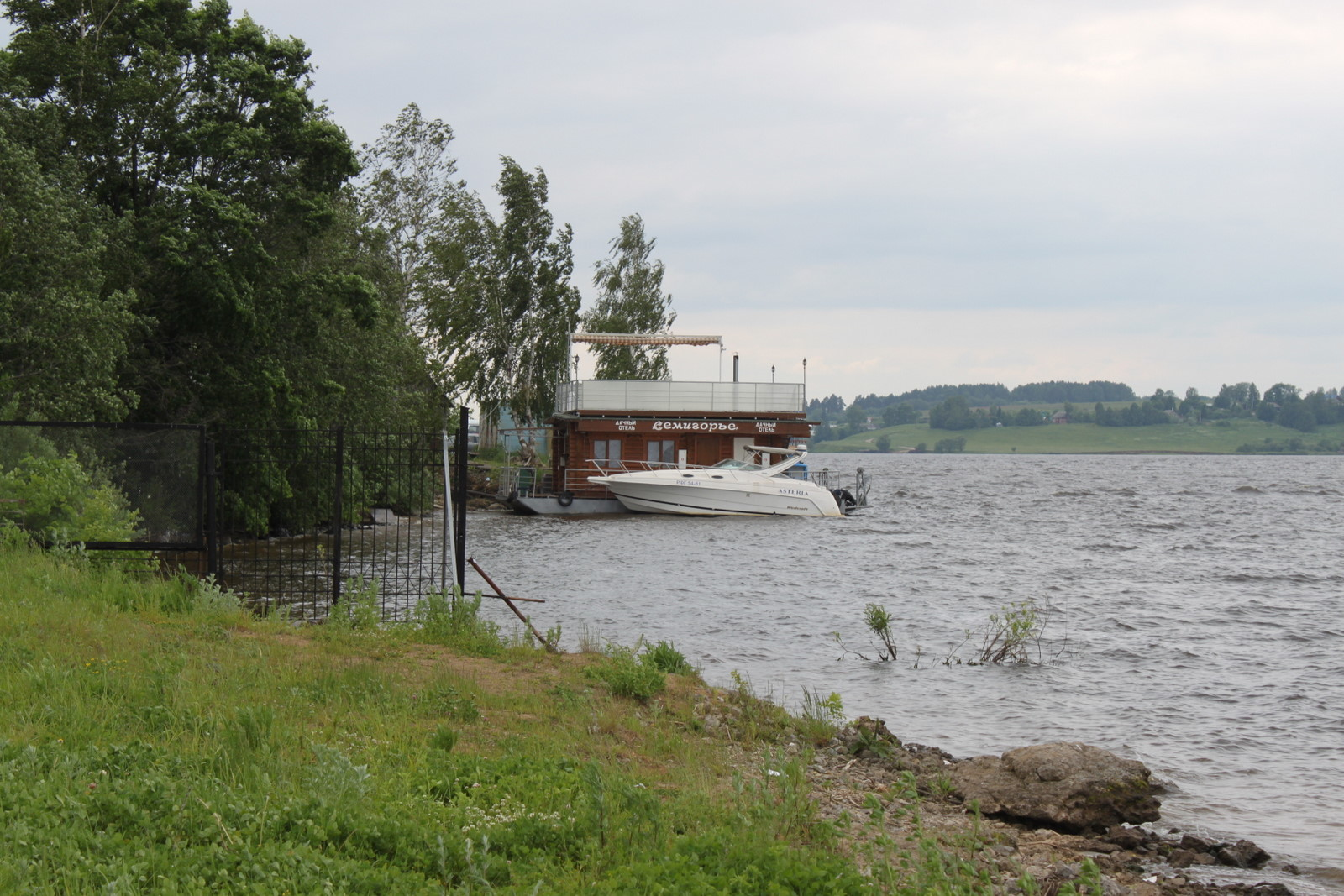 Семигорье. Причал